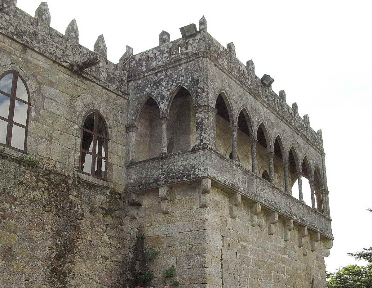 Castelo de Soutomaior, provincia de Pontevedra